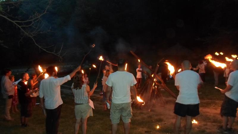 Српски (ћирилица): Скуп родноверних Купало